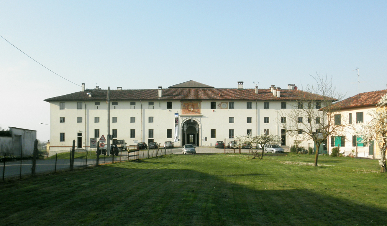 Palazzo Calderari a Turano Lodigiano, facciata lato paese.